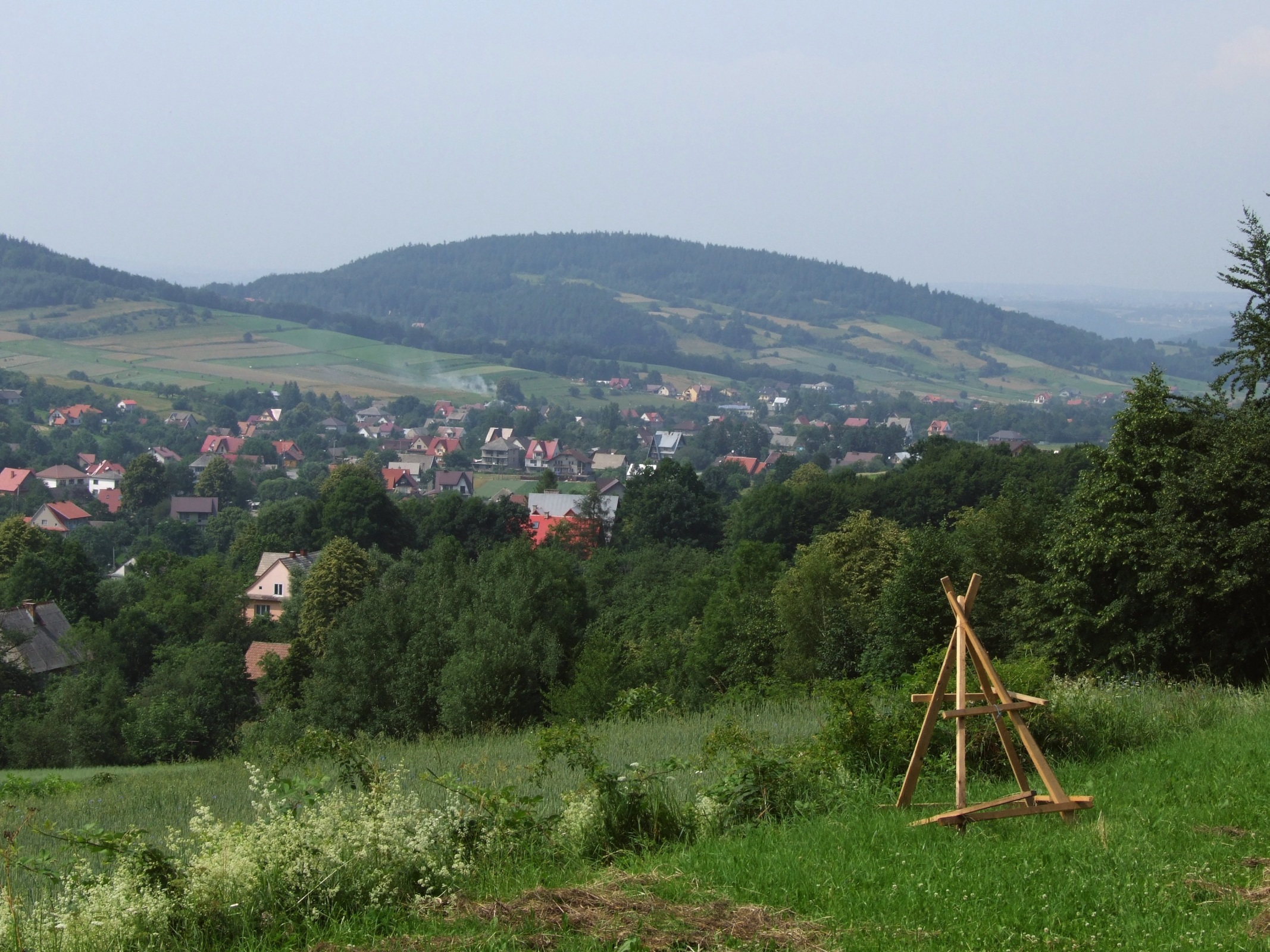 Widok z zielonego szlaku Poręba - Kamiennik Północny (Beskid Makowski)